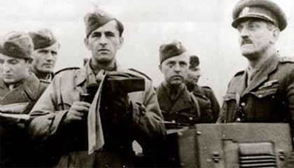 Slovensko, 10.října 1944, terén blízko Žiaru nad Hronom. Štáb 2.čs.parabrigády, čelně postavený s mapou škpt. Karel Hlásný (1911-1982), vpravo bokem postavený plk.Vladimír Přikryl